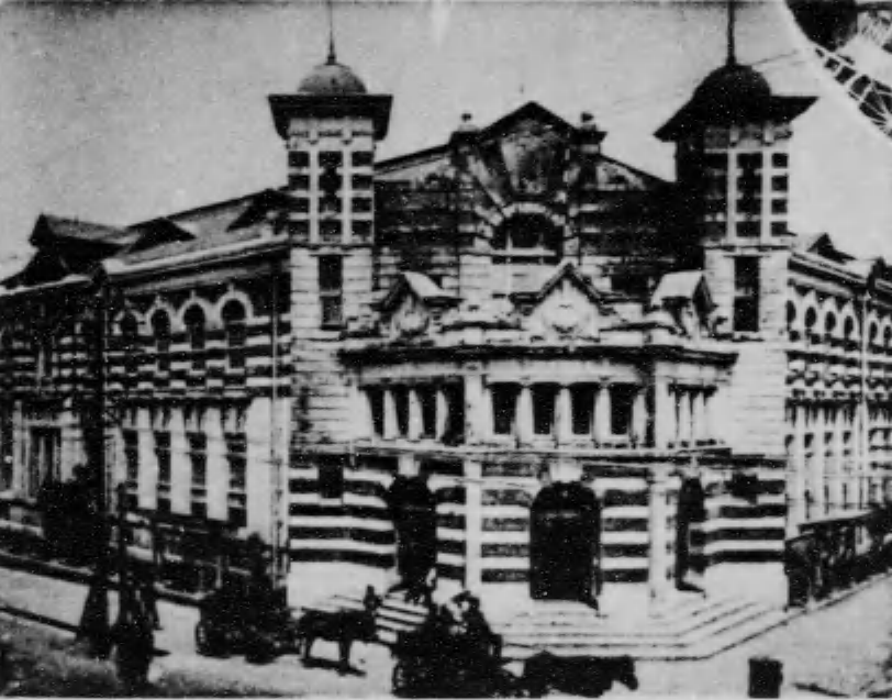 臺南郵便局，現已不存